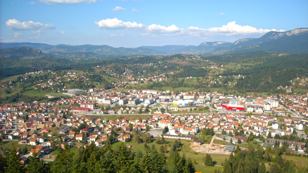 Град Пале, слика из 2009. године